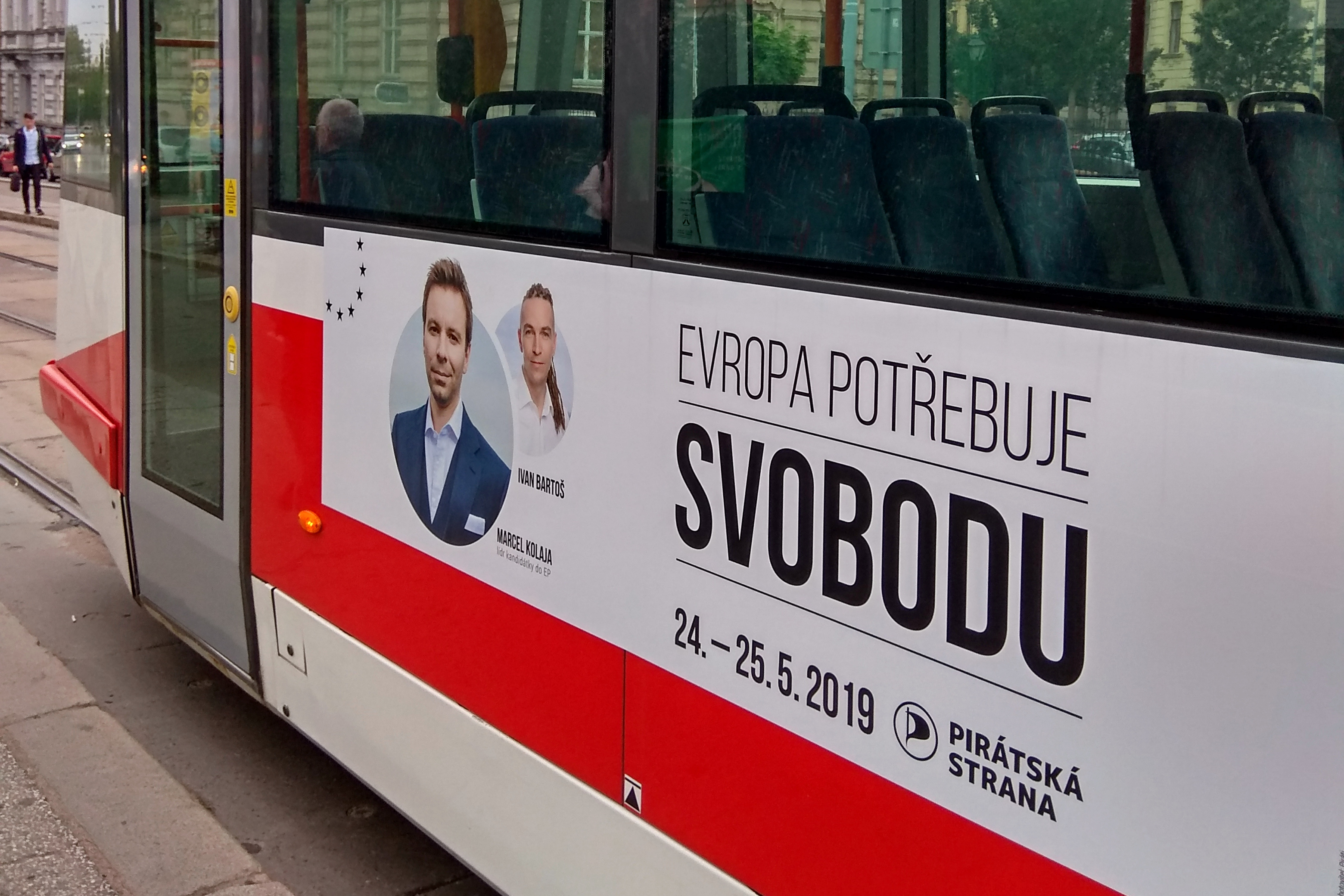 Předvolební banner České pirátské strany (Pirátů) 14. května 2019 před volbami do Evropského parlamentu. Umístěný na tramvaji v zastávce MHD Konečného náměstí na Veveří ulici v Brně.